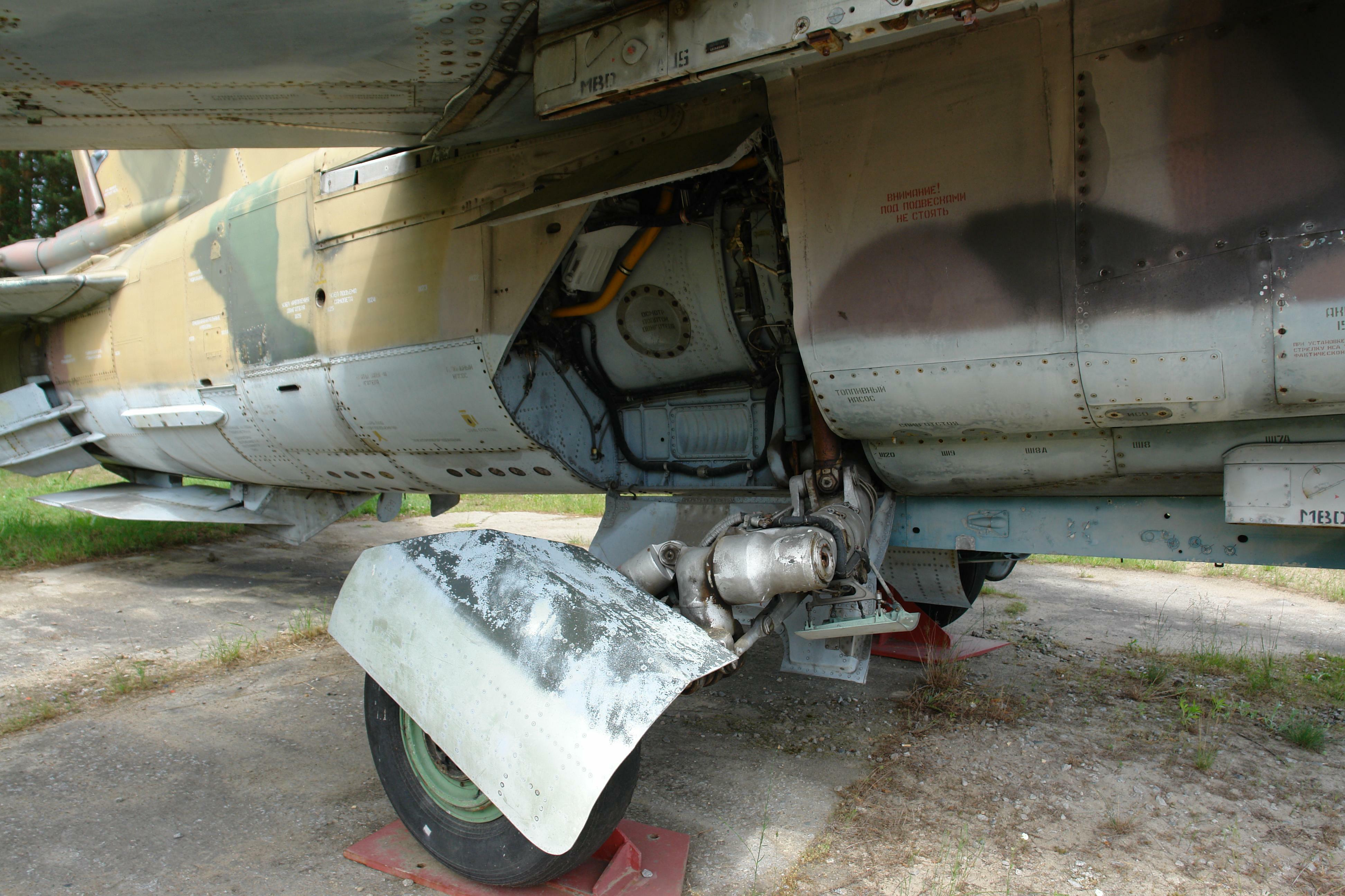 MiG23-UB